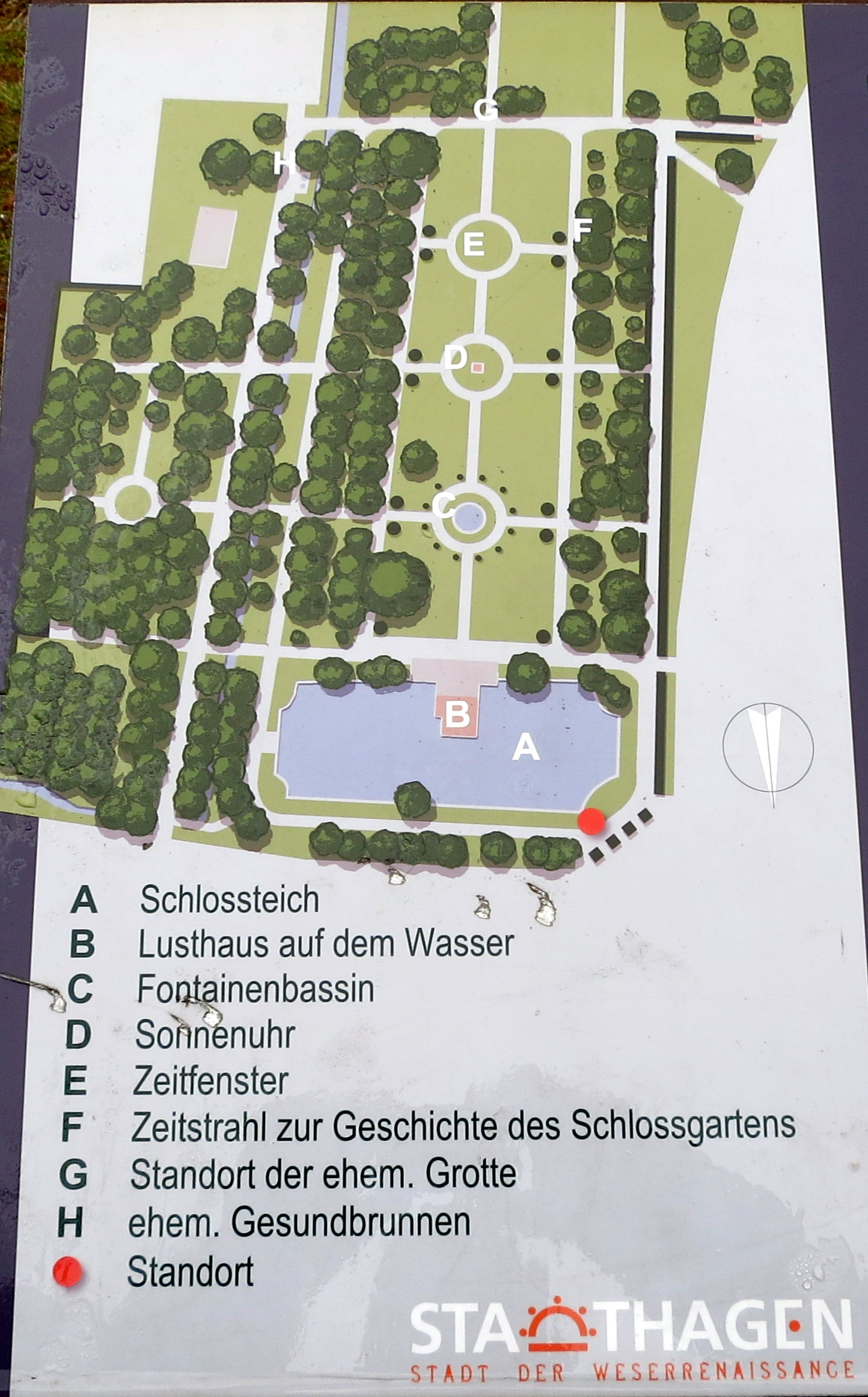 Der Stadtgarten ist im Winter wenig belebt.